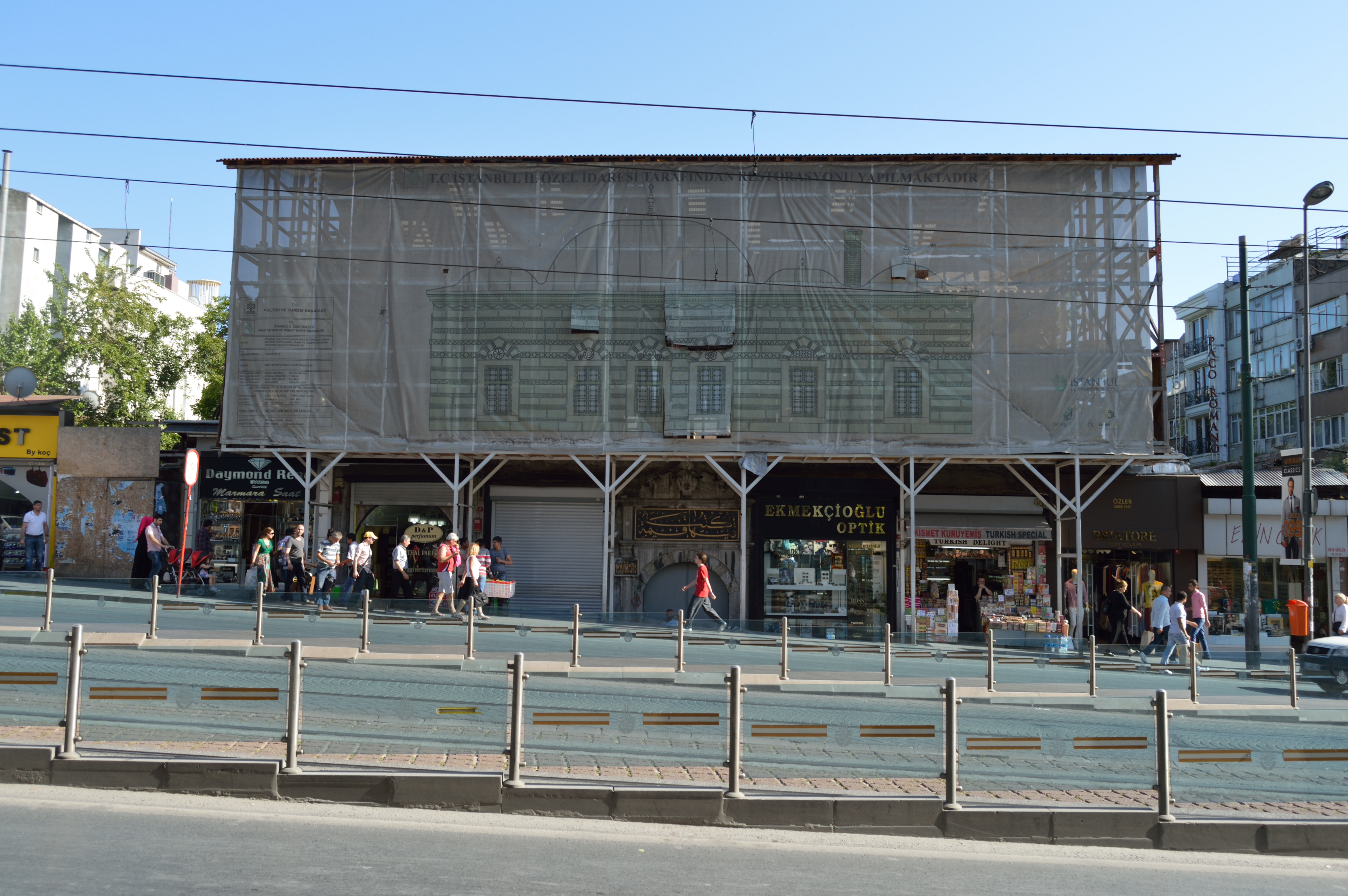 Ragıp Paşa Kütüphanesi